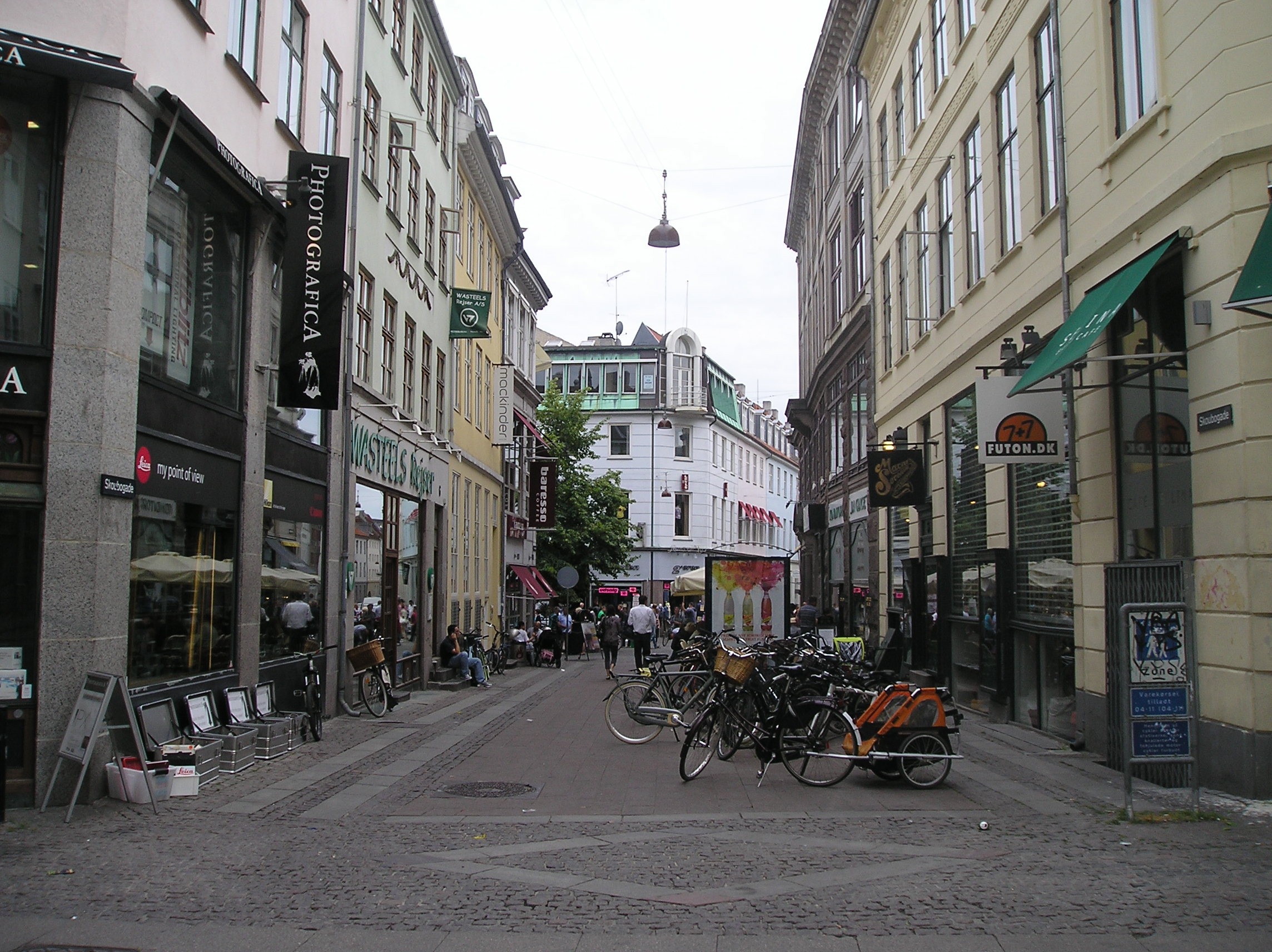 The street Skoubogade in Copenhagen.